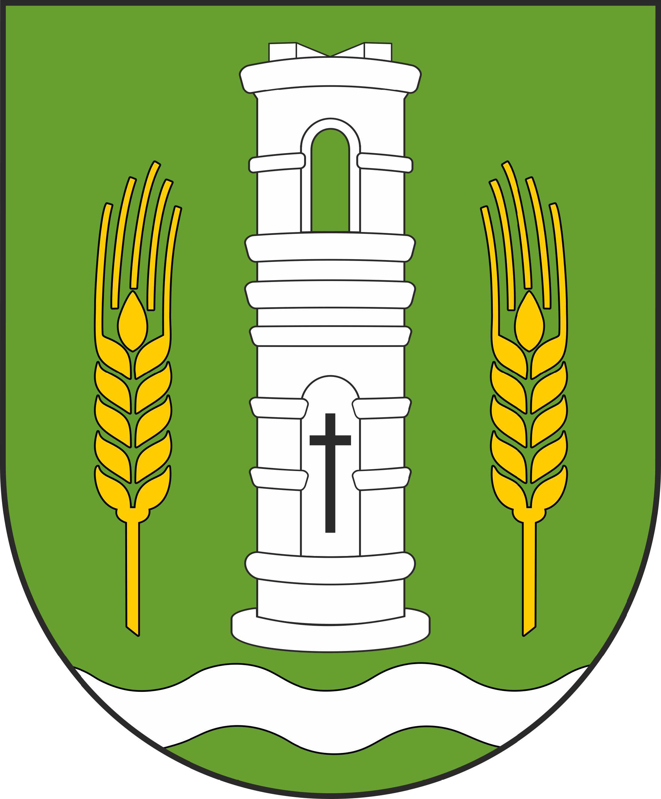 Herb gminy Świątki